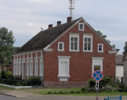 Stary dom ceglany przy drodze nr 3 w Miękowie, pow. goleniowski. Autor: Maks Saczywko (Soczewa)